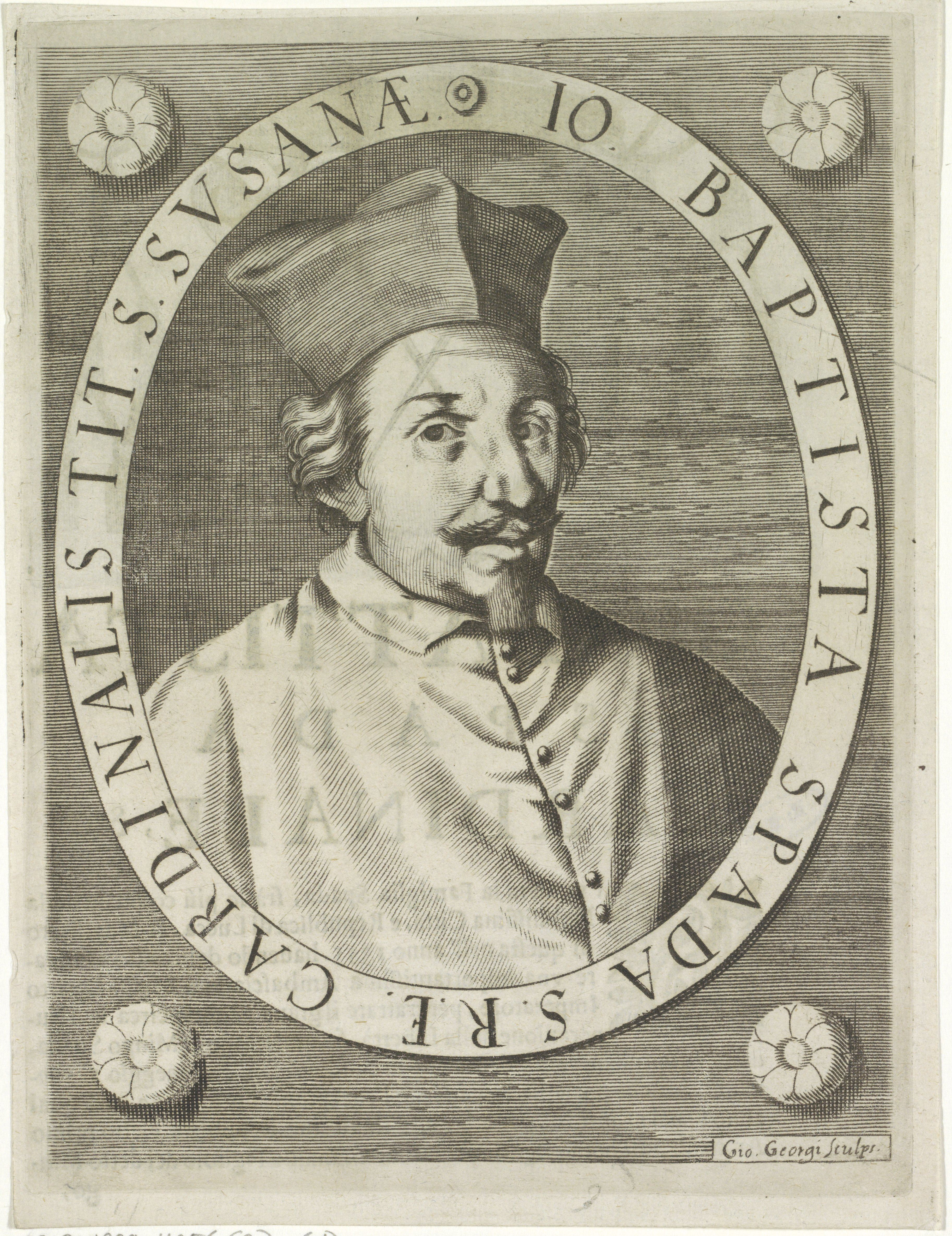 IdentificatieTitel(s): Portret van kardinaal Giambattista SpadaObjecttype: prent boekillustratie Objectnummer: RP-P-1909-4956(R)VervaardigingVervaardiger: prentmaker: Giovanni Georgi (vermeld op object)Plaats vervaardiging: ItaliëDatering: 1600 - 1699Fysieke kenmerken: gravureMateriaal: papier Techniek: graveren (drukprocedé)Afmetingen: plaatrand: h 195 mm × b 148 mmOnderwerpWat: historical personscardinalWie: Giambattista SpadaVerwerving en rechtenVerwerving: aankoop 1905Copyright: Publiek domein